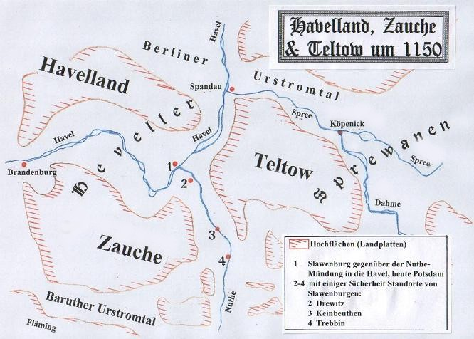 This image was copied from de. The original description was: Karte Zauche, Teltow, Havelland 1150 / Brandenburg Selbst gezeichnet, Mai 2004 Vorläufige Karte, erster Versuch. Ich stelle sie in all ihrer Vorläufigkeit trotzdem schon mal ein als lebendiges Mahnmal an den Meister der Karten, Sansculotte, sich ihrer anzunehmen und etwas draus zu machen ... !!! GNU FDL